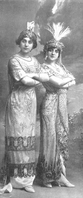 Fotografía de las cantantes españolas Cándida y Blanquita Suárez publicada en 1913 con motivo de su interpretación de zarzuelas en el Teatro Martín de Madrid